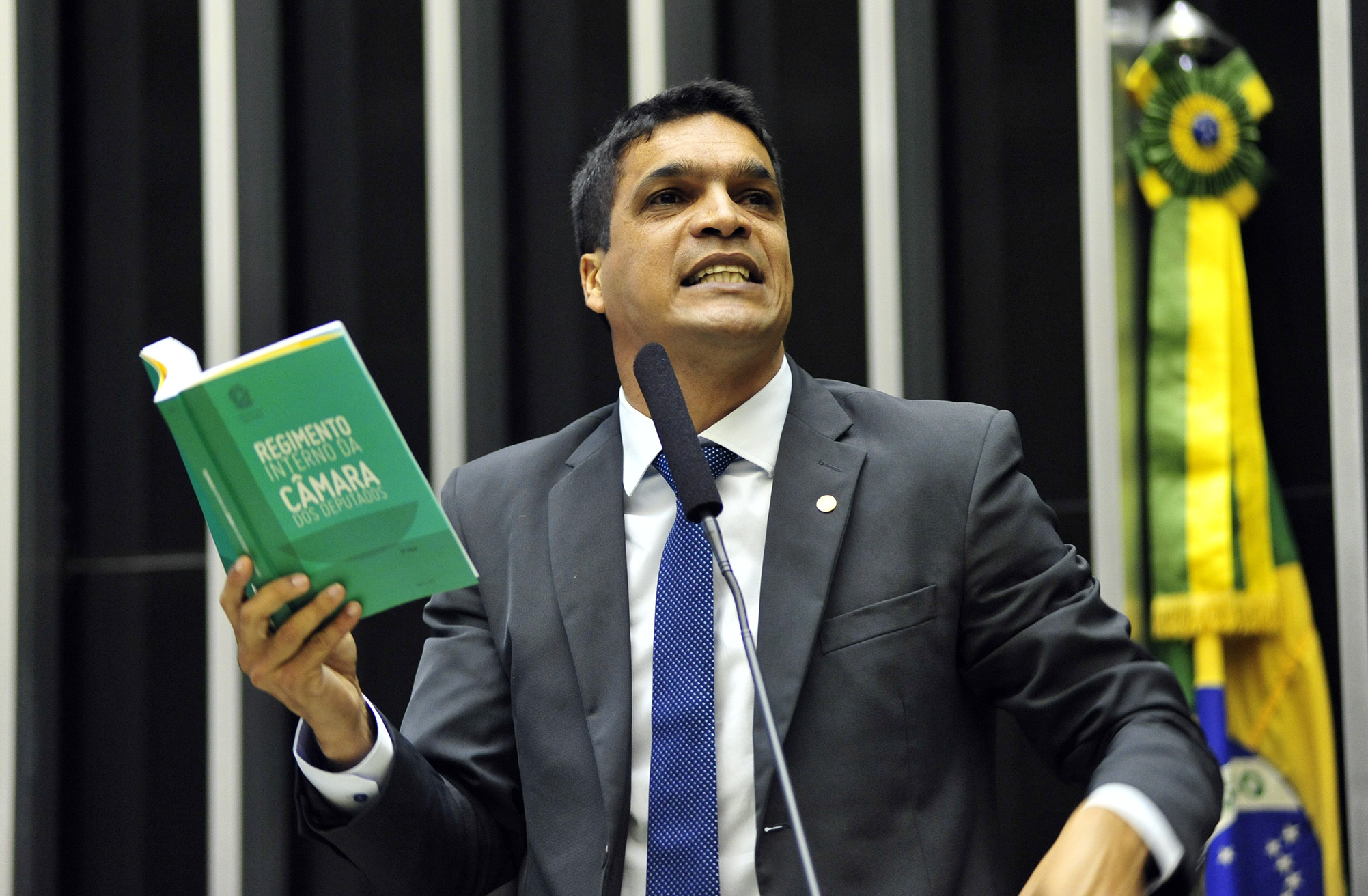 Pequeno Expediente - Dep. Cabo Daciolo (PSOL-RJ)